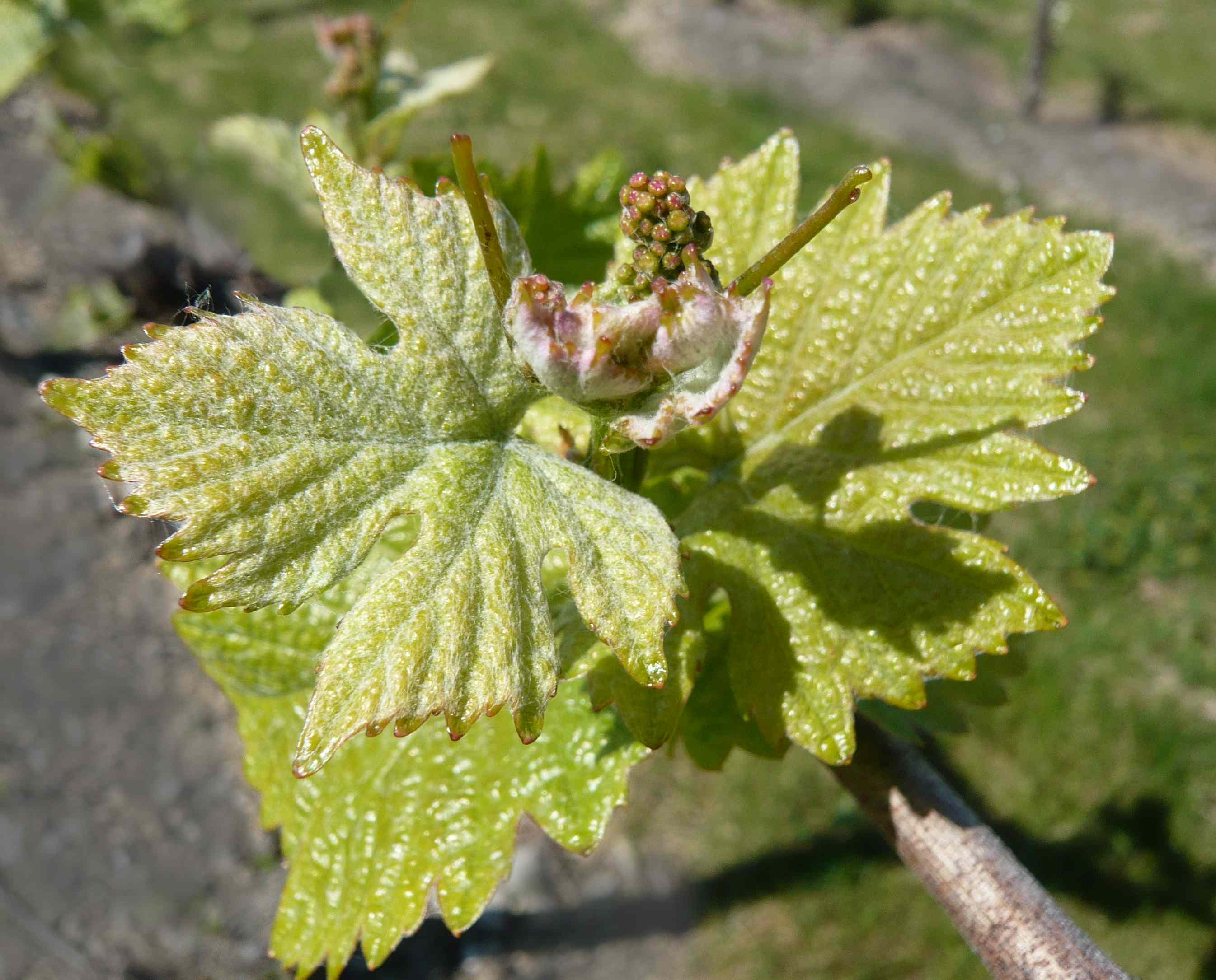 Jeunes pousses de Pinot noir, conservatoire du vignoble charentais, Cherves 17, France